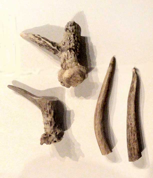 Percutores de osso, tradição Umbu